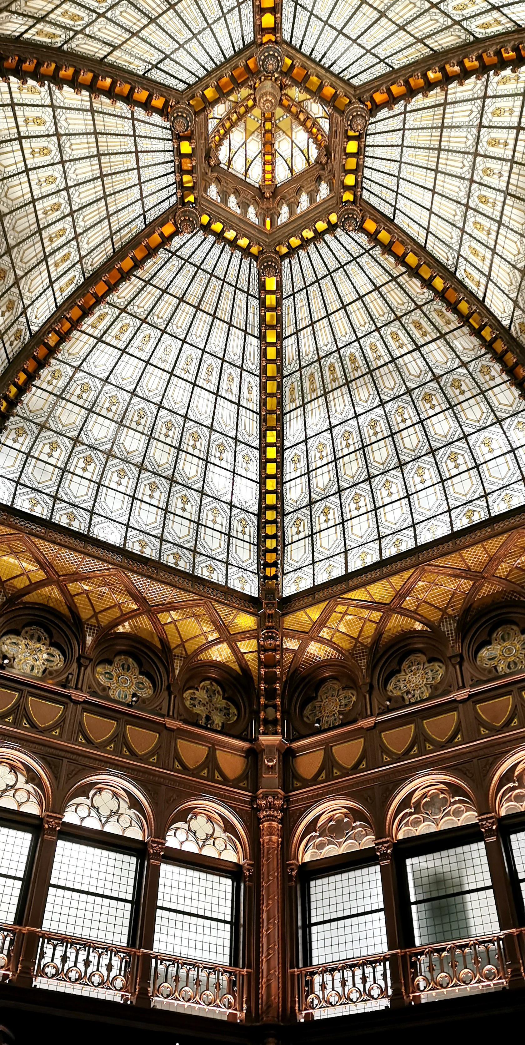 A Párizsi udvar a 2019-es felújítás után